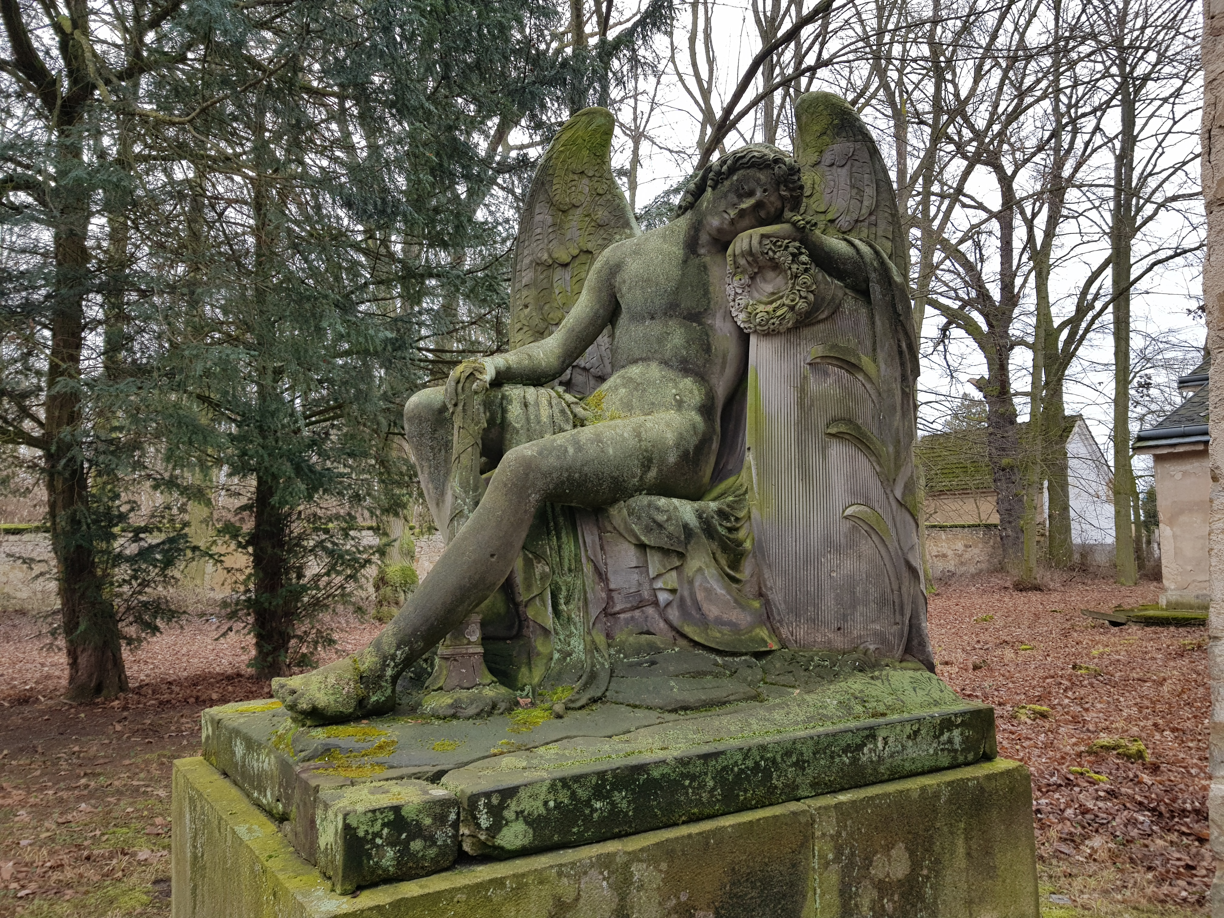 Hrobka Kinských v Budenicích